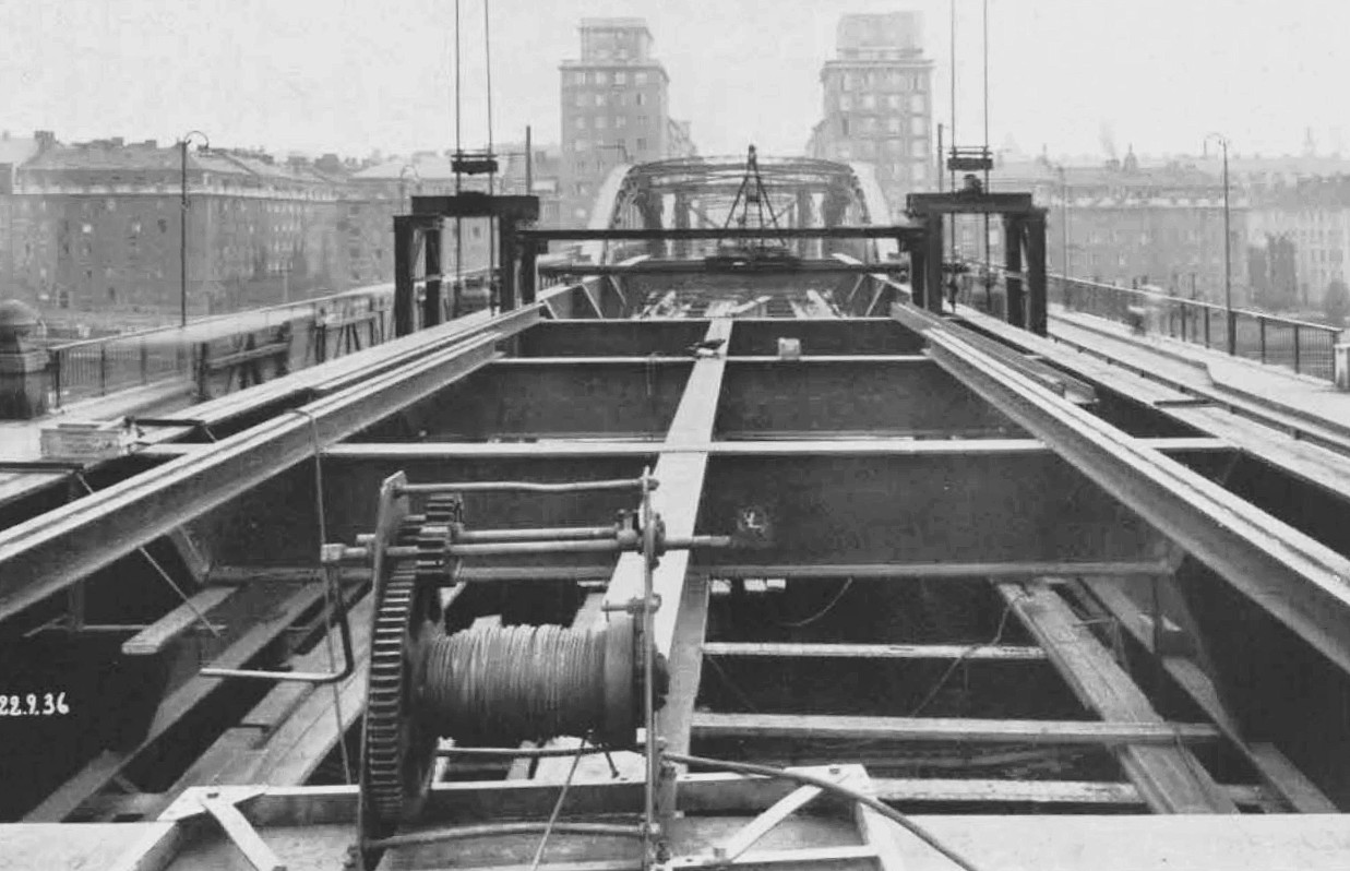 Ombyggnad av gamla S:t Eriksbron